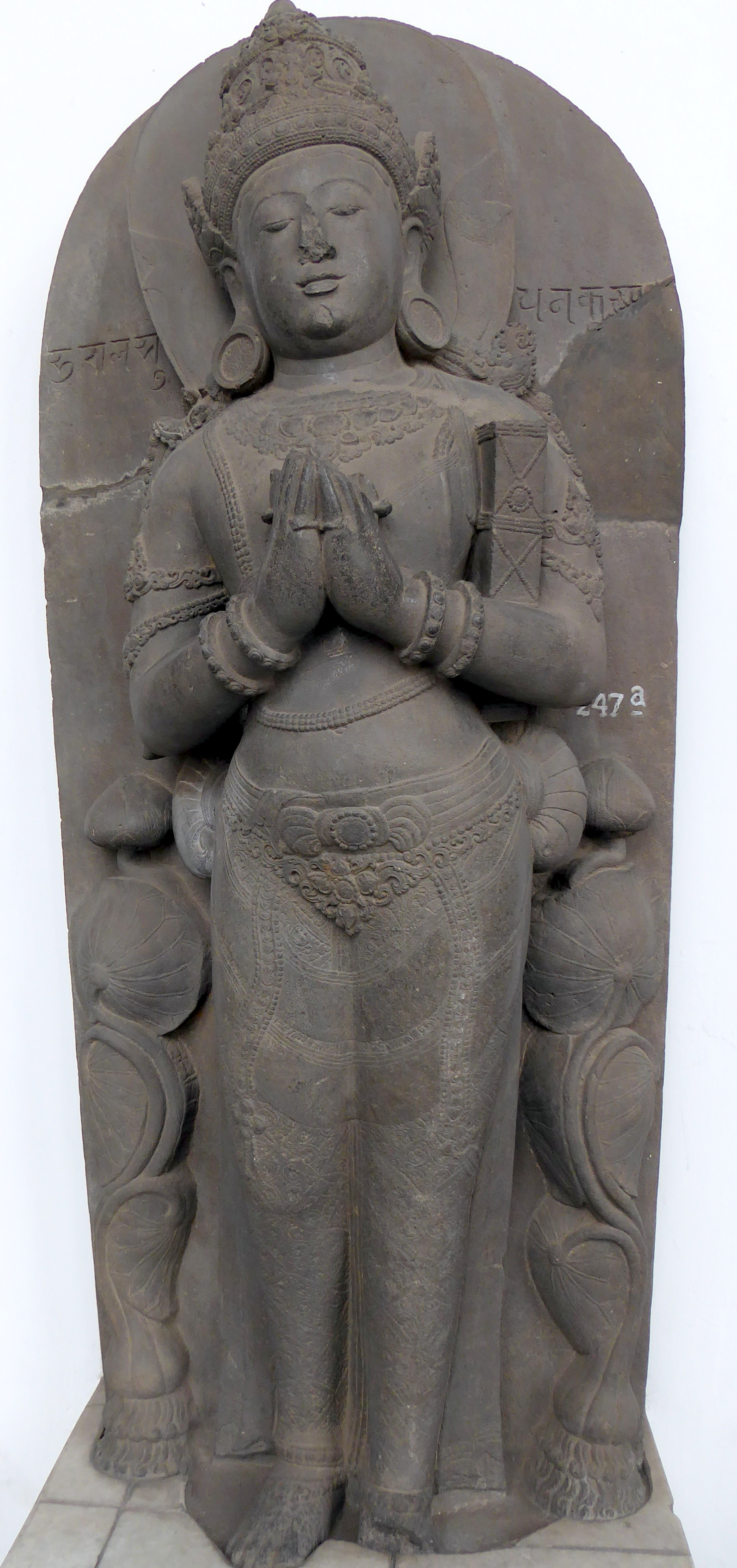 Candi Jago, Malang, East Java